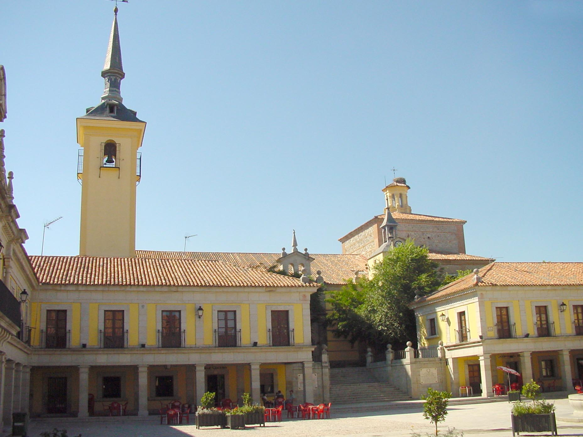 Iglesia y Plaza Mayor de Brunete.